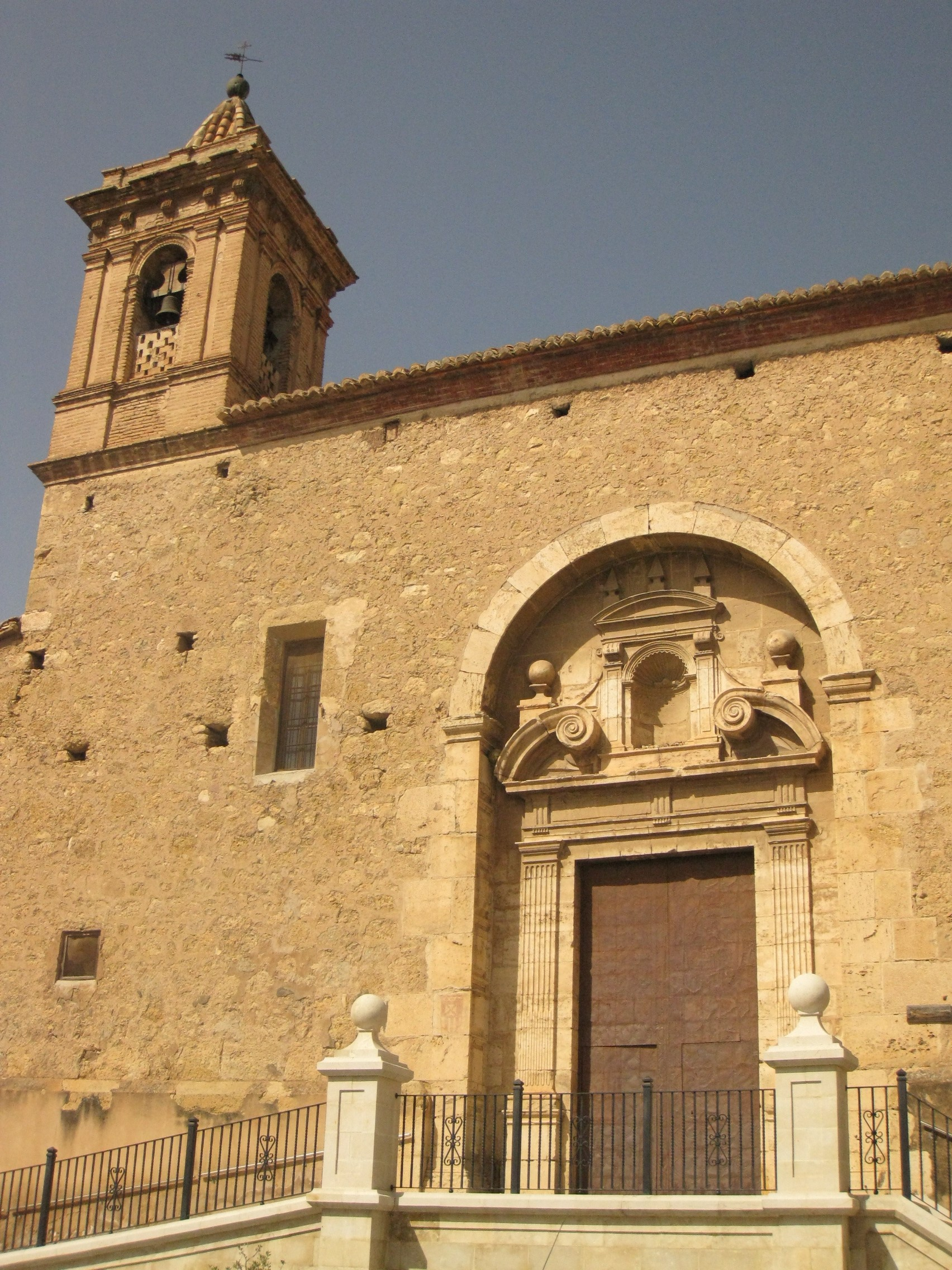 Església de Sant Martí (Sogorb) 07.104-010.